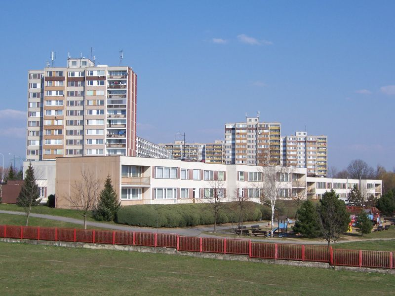 Praha-Petrovice, sídliště Dobrá Voda / Prague-Petrovice, housing estate Dobrá Voda